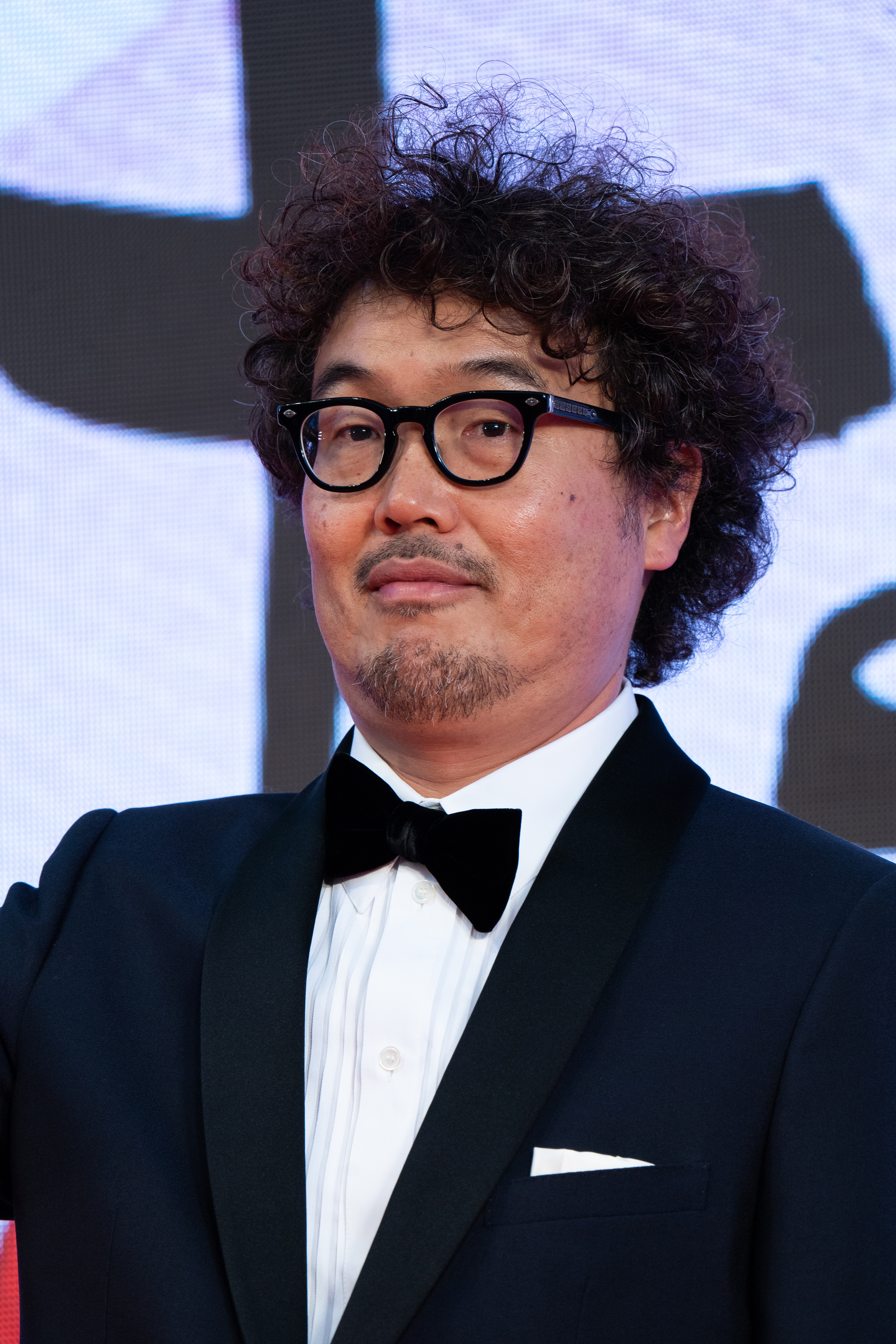 第32回 東京国際映画祭 オープニングセレモニー 三木康一郎 (“隠れビッチ”やってました。)